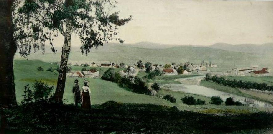 Widok na Ustronie z Fortecznej Góry w XIX wieku